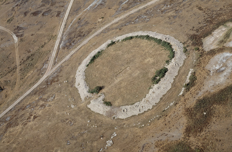 Fornborg RAÄnr Hulterstad 20:1. Bilden är tagen mot (väderstreck): SV Motiv: Hulterstad 20:1 Nyckelord: Flygbilder, Riksintressen, Världsarv Kategori: Fornborg Fornborg RAÄnr Hulterstad 20:1. Bilden är tagen mot (väderstreck): SV. Hulterstad 20:1.